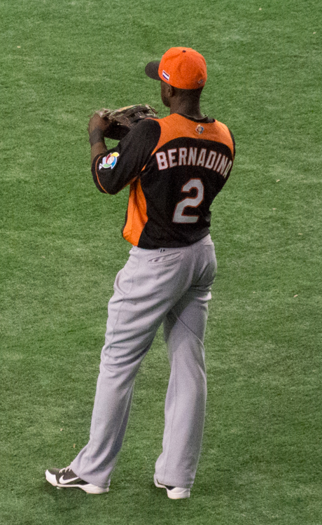 Roger Bernadina